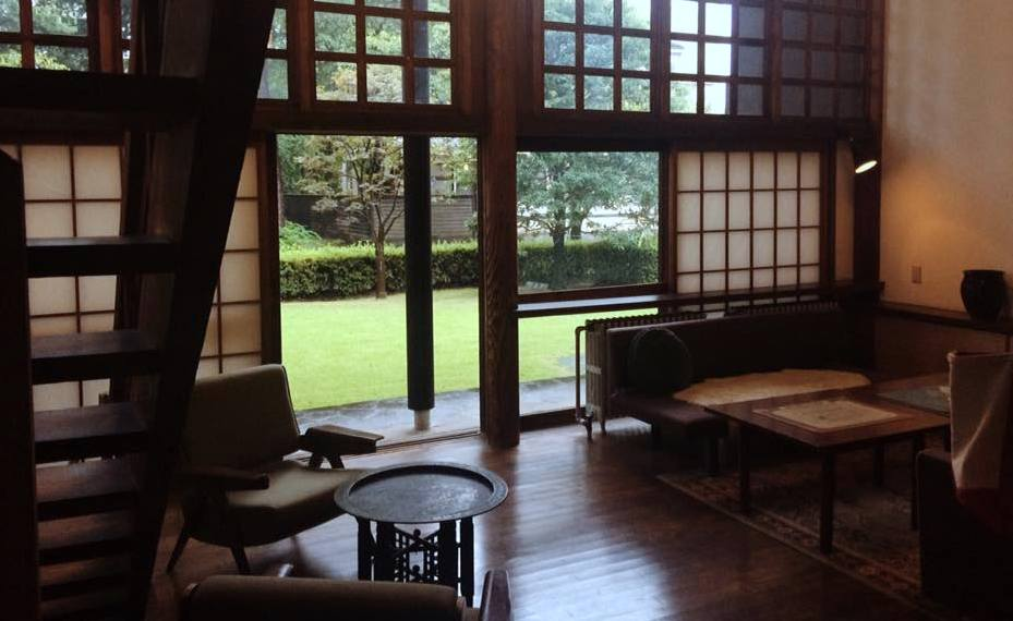 Tradicinė šiodži stumdoma siena ir už jos esantis koridorius - engava.